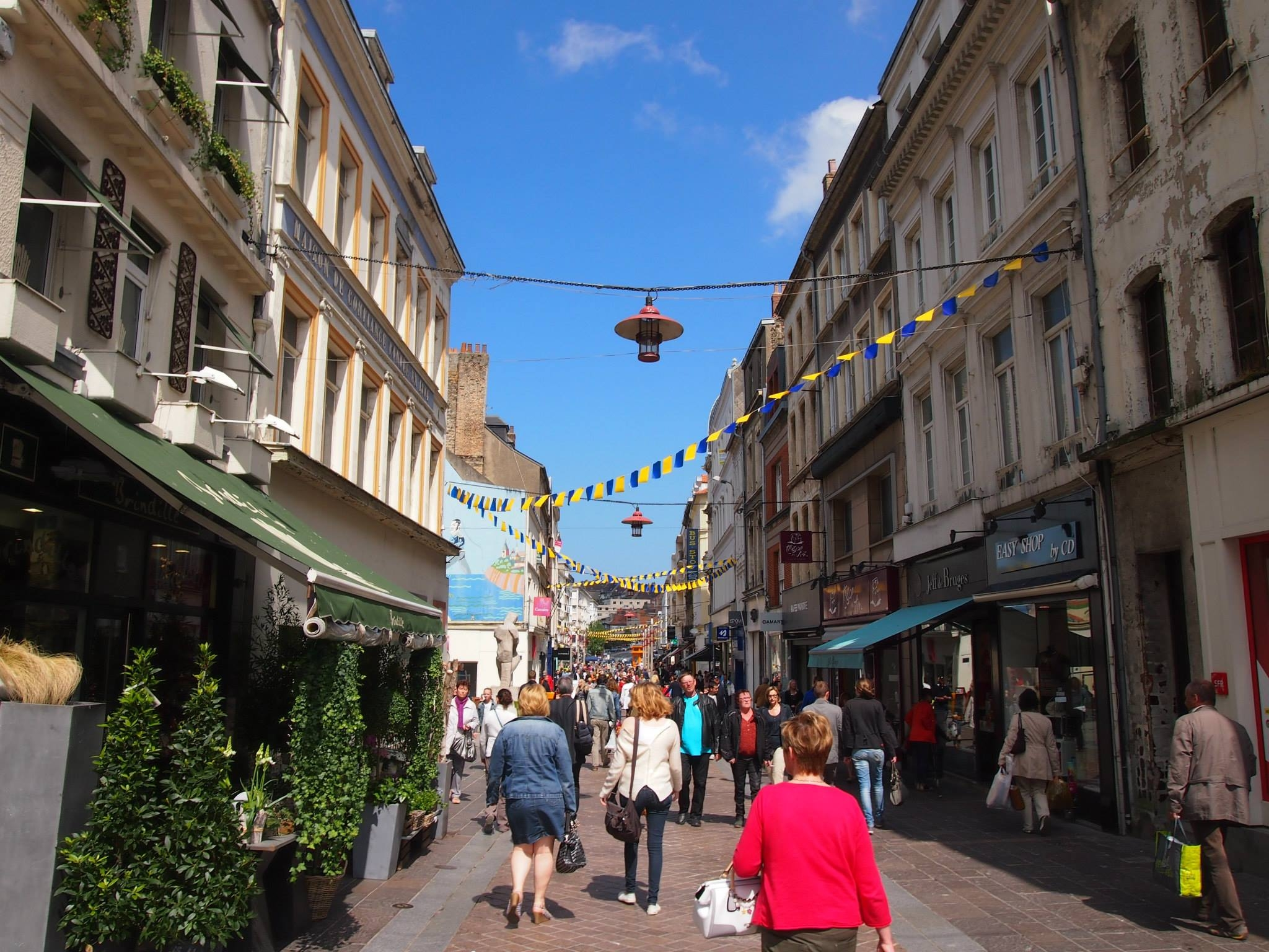 Rue Thiers dans le centre-ville de Boulogne-sur-Mer (Pas-de-Calais, France)